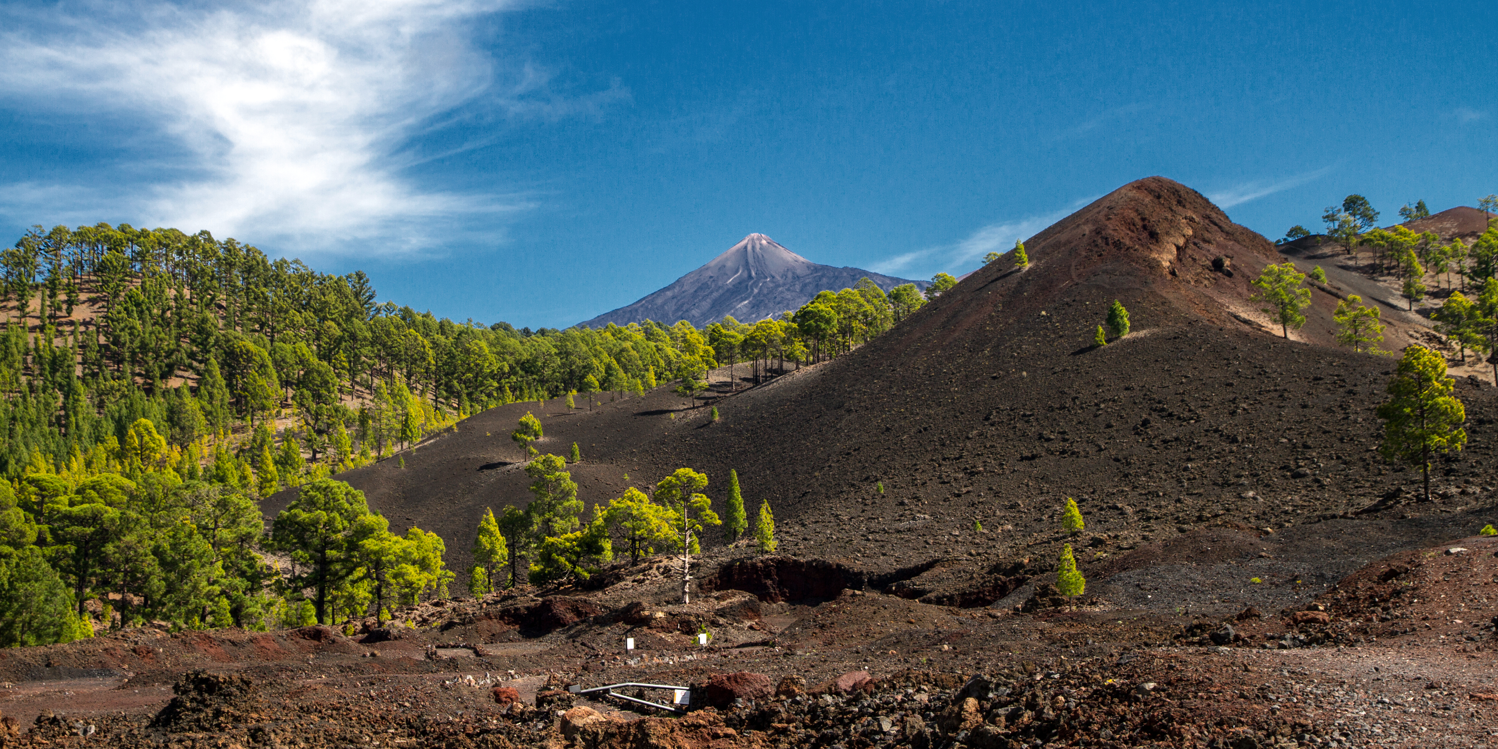 sámara